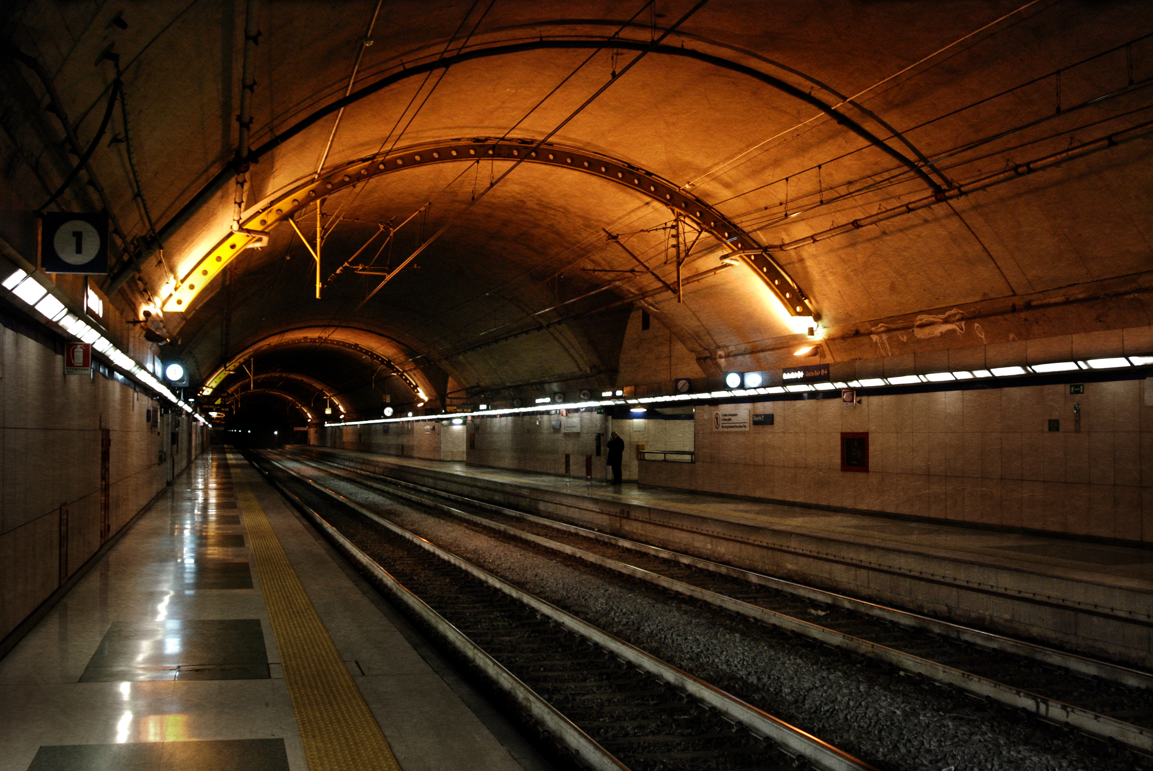 Stazione ferroviaria di Sanremo, le banchine e i binari